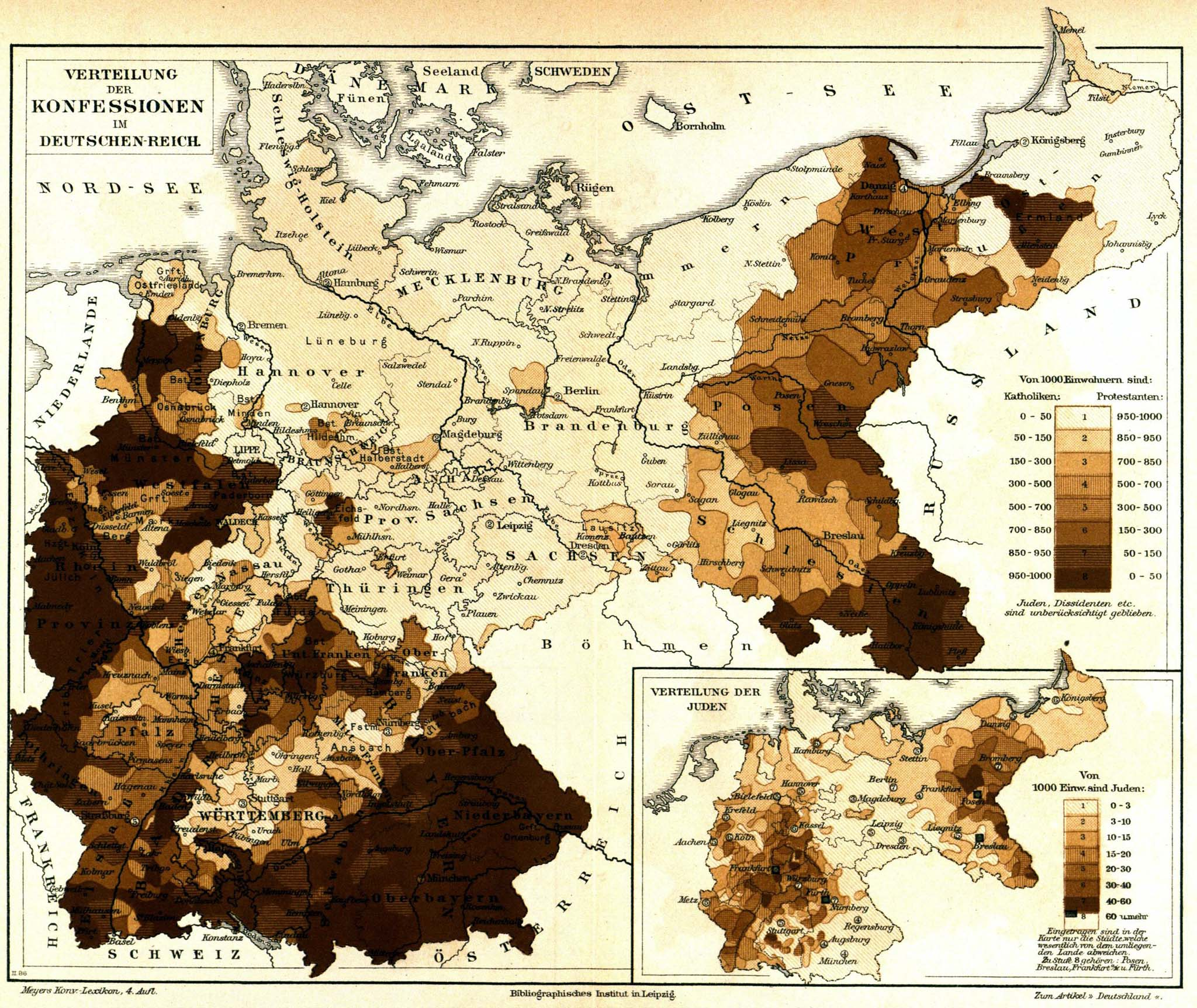 Verteilung der Konfessionen im Deutschen Reich